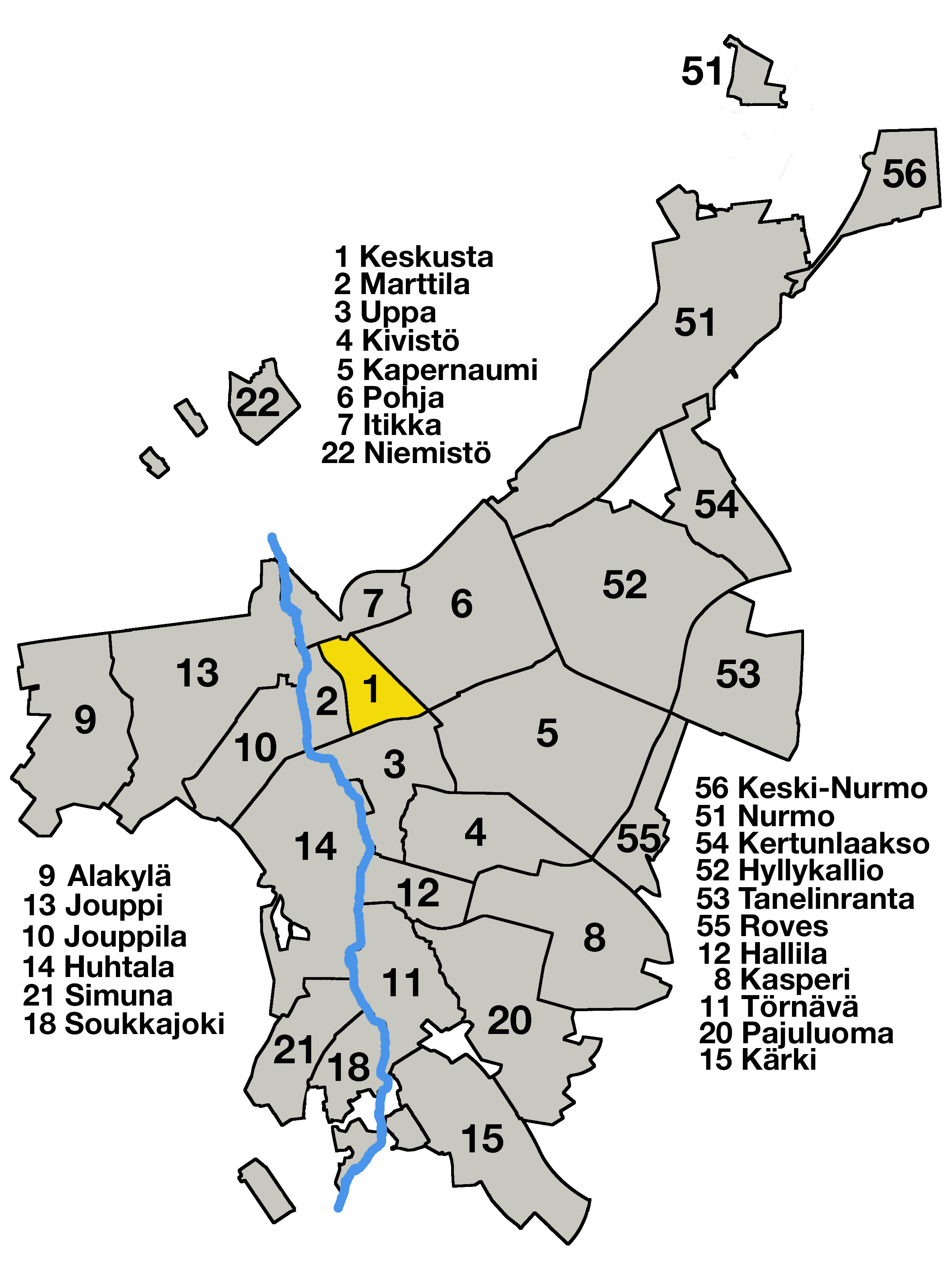 Seinäjoen kantakaupungin kaupunginosat, 1 Keskusta